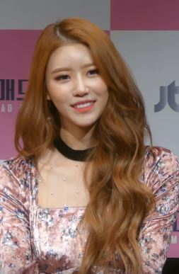 26일 오후 서울시 마포구 상암동 JTBC 사옥에서 JTBC4 신규 예능프로그램 ‘마이 매드 뷰티3’ 제작발표회가 열려 러블리즈 미주가 참석해 포토타임에 포즈를 취하고 있다.